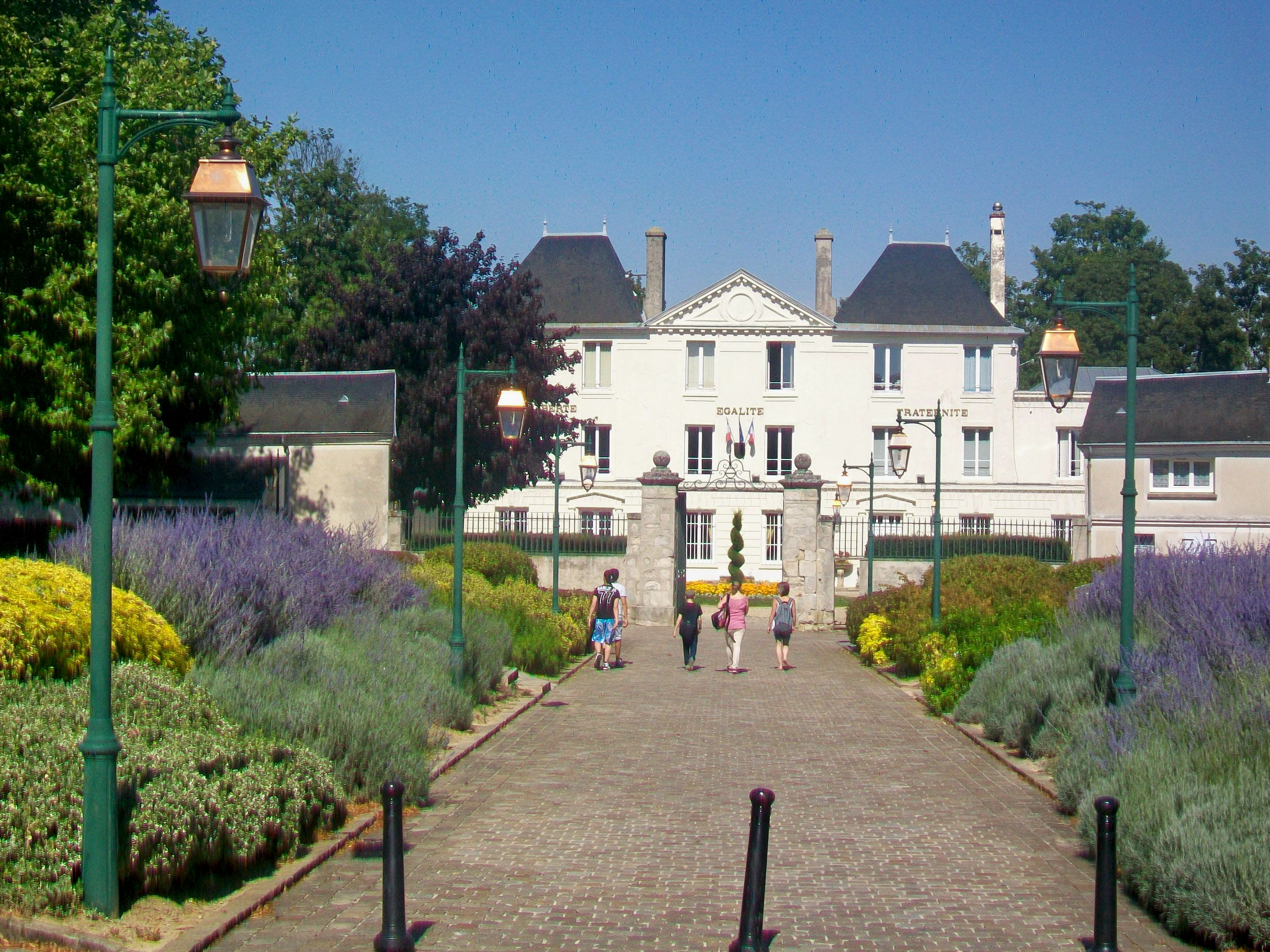 La mairie de Saint-Soupplets, installée dans l'ancien château de Maulny entouré d'un parc, allée du Château.